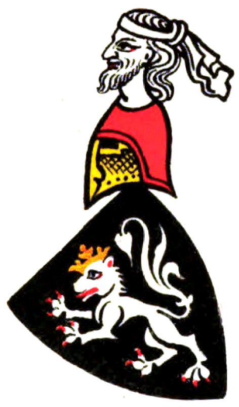 Wappen derer von Pfirt (Herren von Pfirt), aus der Baseler Gegend, eine Ministerialenfamilie (Hauptleute, Pfleger, Vögte) der Grafen von Pfirt (Ferette, Haus Scarponnois und der Habsburger)